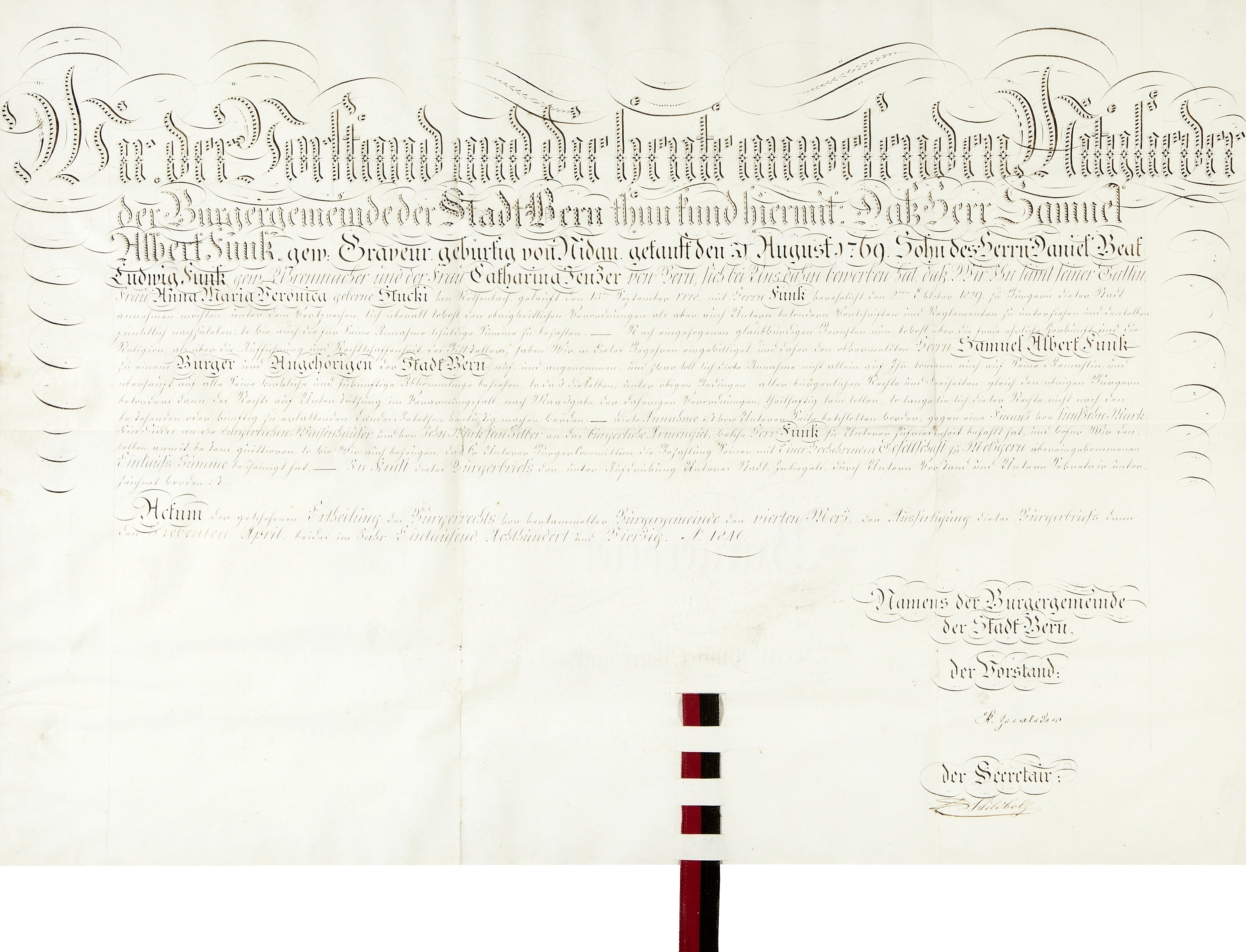 Burgerbrief für Samuel Albert Funk (1769-1842), Graveur und seine Ehefrau Anna Maria Veronica, geb. Stucki.